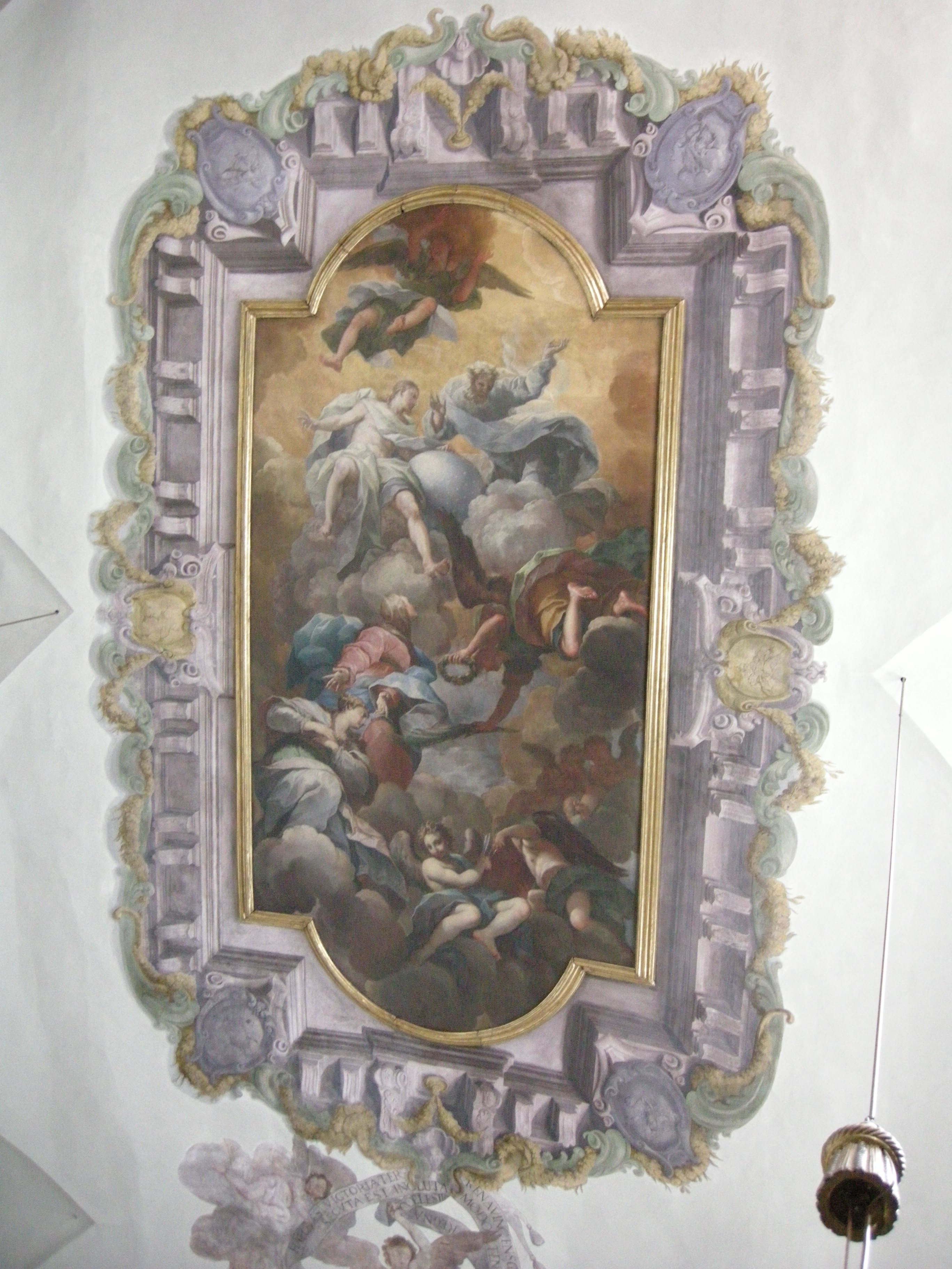 Chiesa delle montalve, soffitto, Giuseppe Nicola Nasini con Santa Vittoria presentata dalla Vergine alla Santissima Trinità (1697)